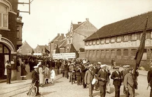 In de jaren 1930 leidde VOS het verzet tegen het geheim Frans-Belgisch Militair Akkoord uit 1920.